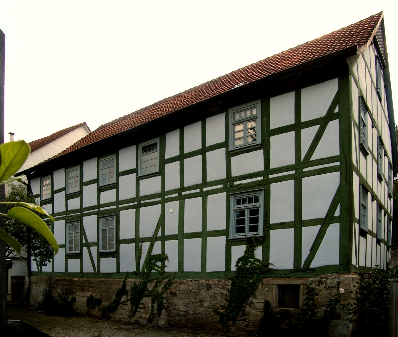 Vöhl - ehem. Synagoge in der Mittelgasse